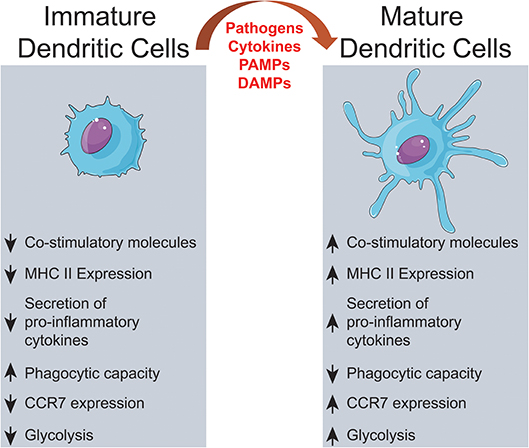 Maturation de la cellule dendritique après une stimulation antigénique